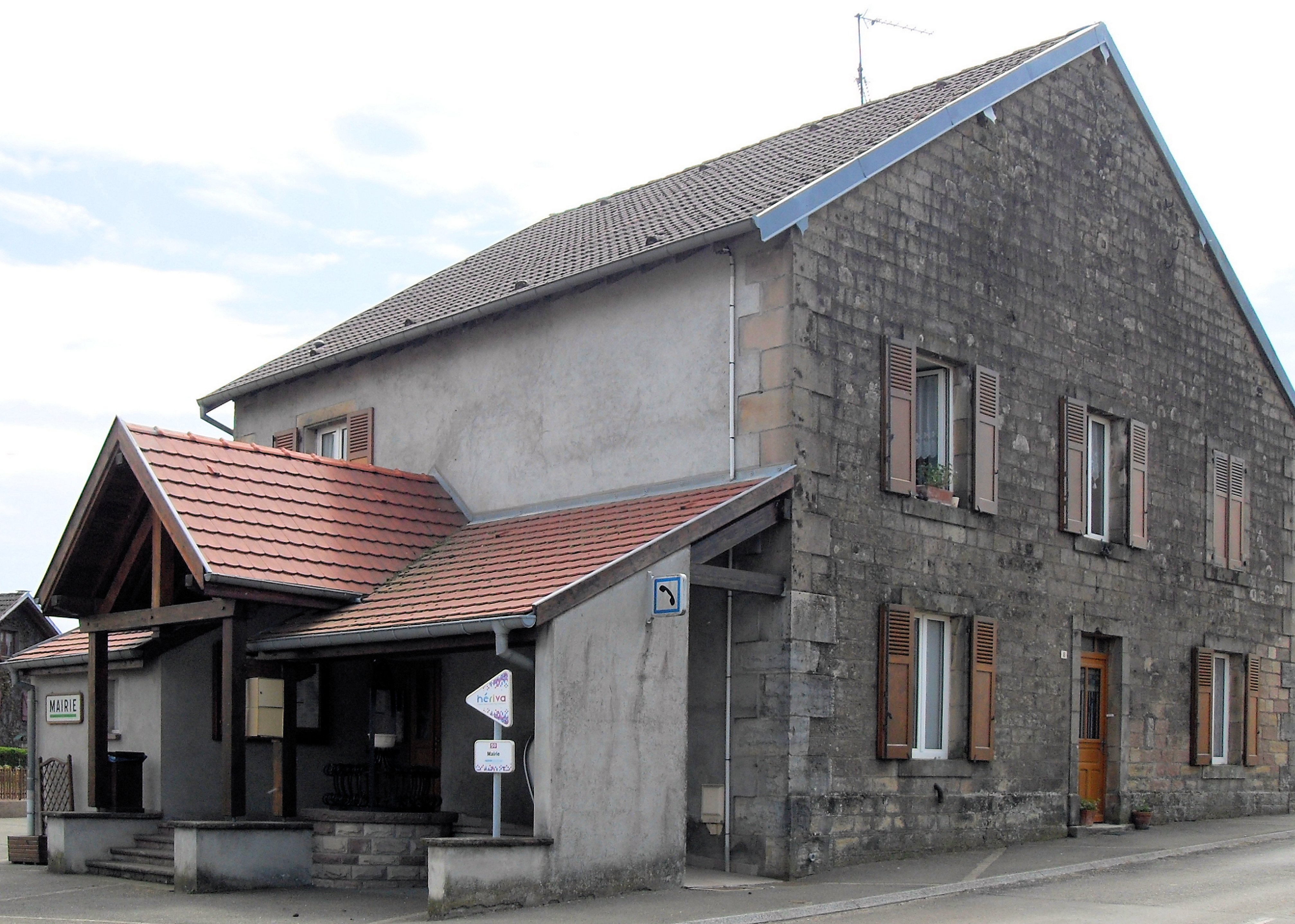 La mairie deMandrevillars